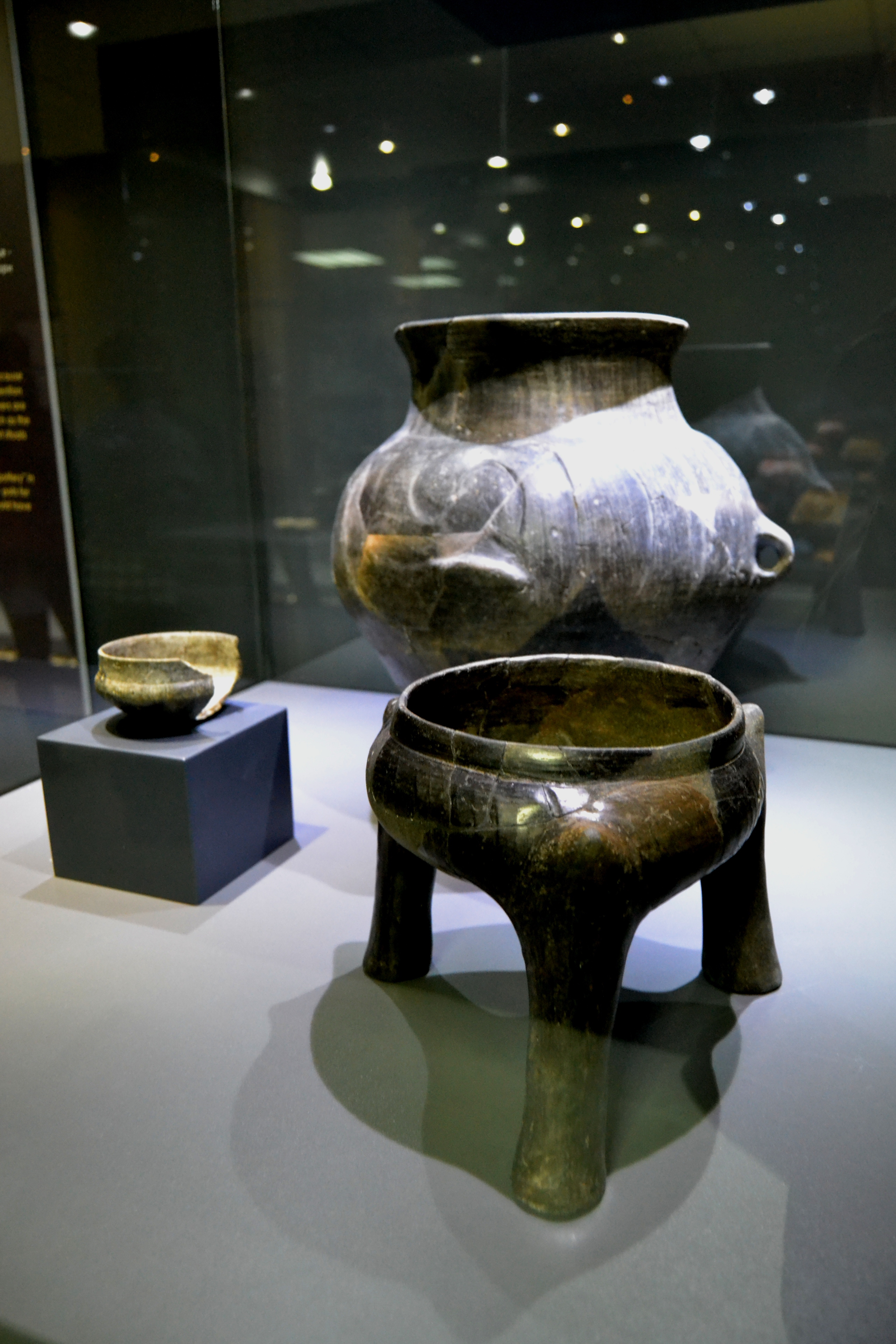 Винча — Бело брдо